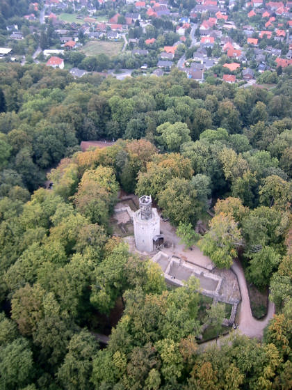 Luftbild der Burg Lichtenberg aus einem Ballon